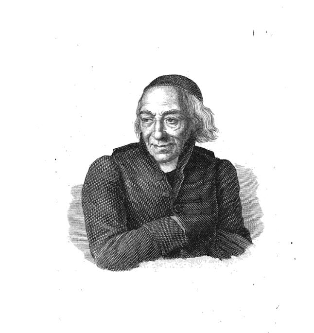 Ritratto di Carlo Fea, da "Miscellanea filologica critica e antiquaria tomo II", Roma 1836